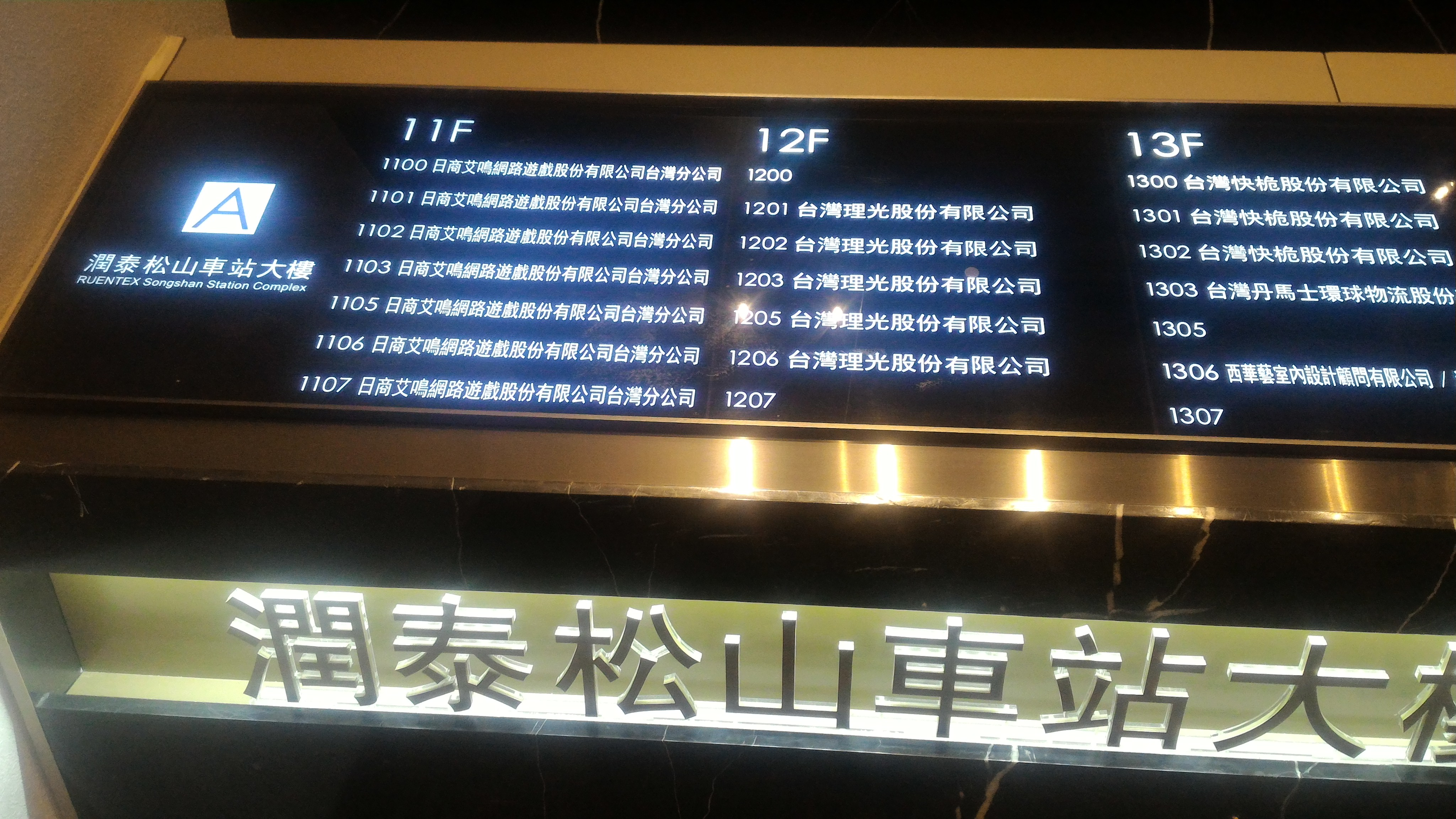 潤泰松山車站大樓A棟11到13樓公司行號牌。